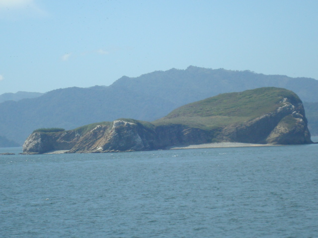 La isla Guayabo, en el Golfo de Nicoya, Costa Rica, es parte de la reserva biológica Islas Guayabo, Pájaros y Los Negritos.